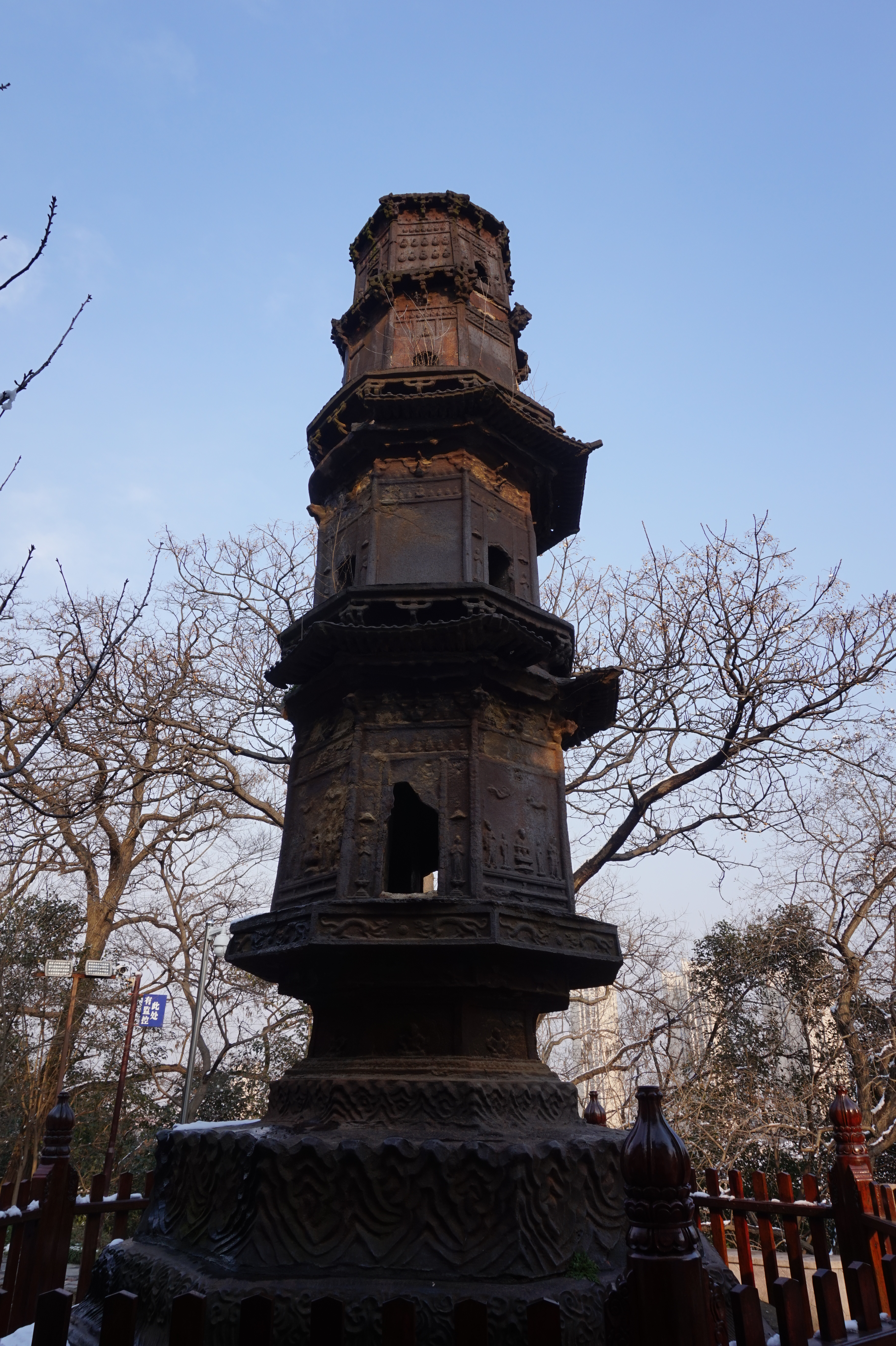 镇江 甘露寺铁塔